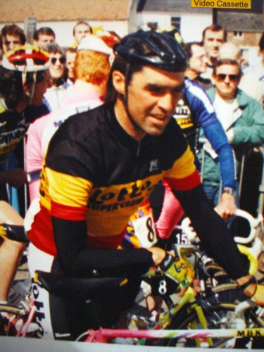 grand prix de Wallonie 1990.